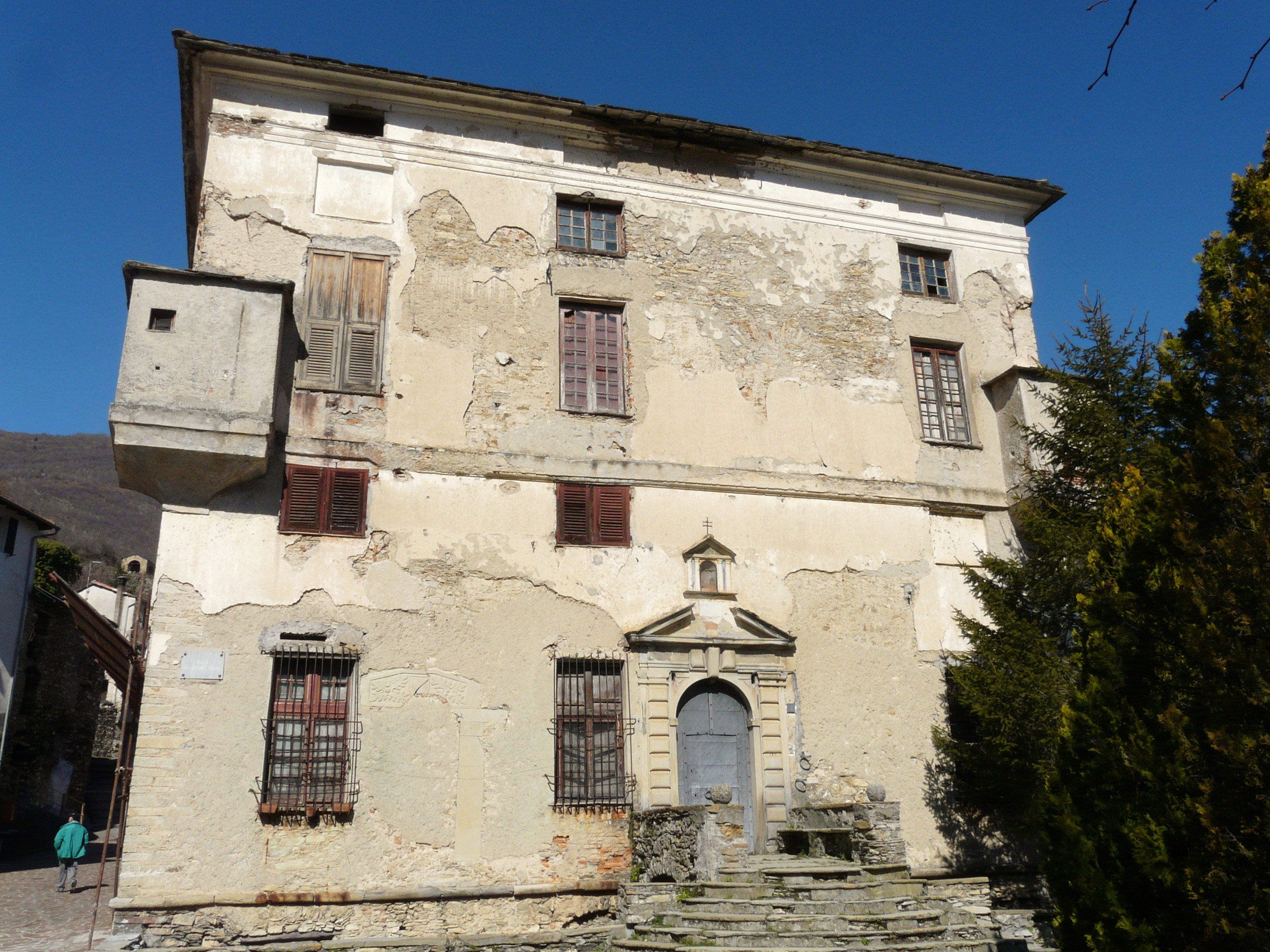 Castello dei marchesi Clavesana, Rezzo, Liguria, Italia